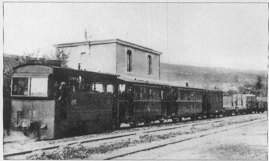 en gare d'Ay,_la locomotive Blanc-Misseron N°_13_du C.B.R et un train_mixte (voyageur/marchandises).